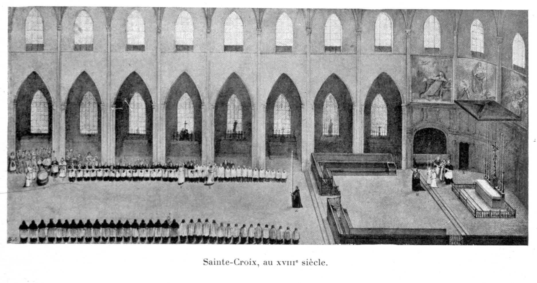 Illustrations pour l'Histoire des églises et chapelles de Lyon